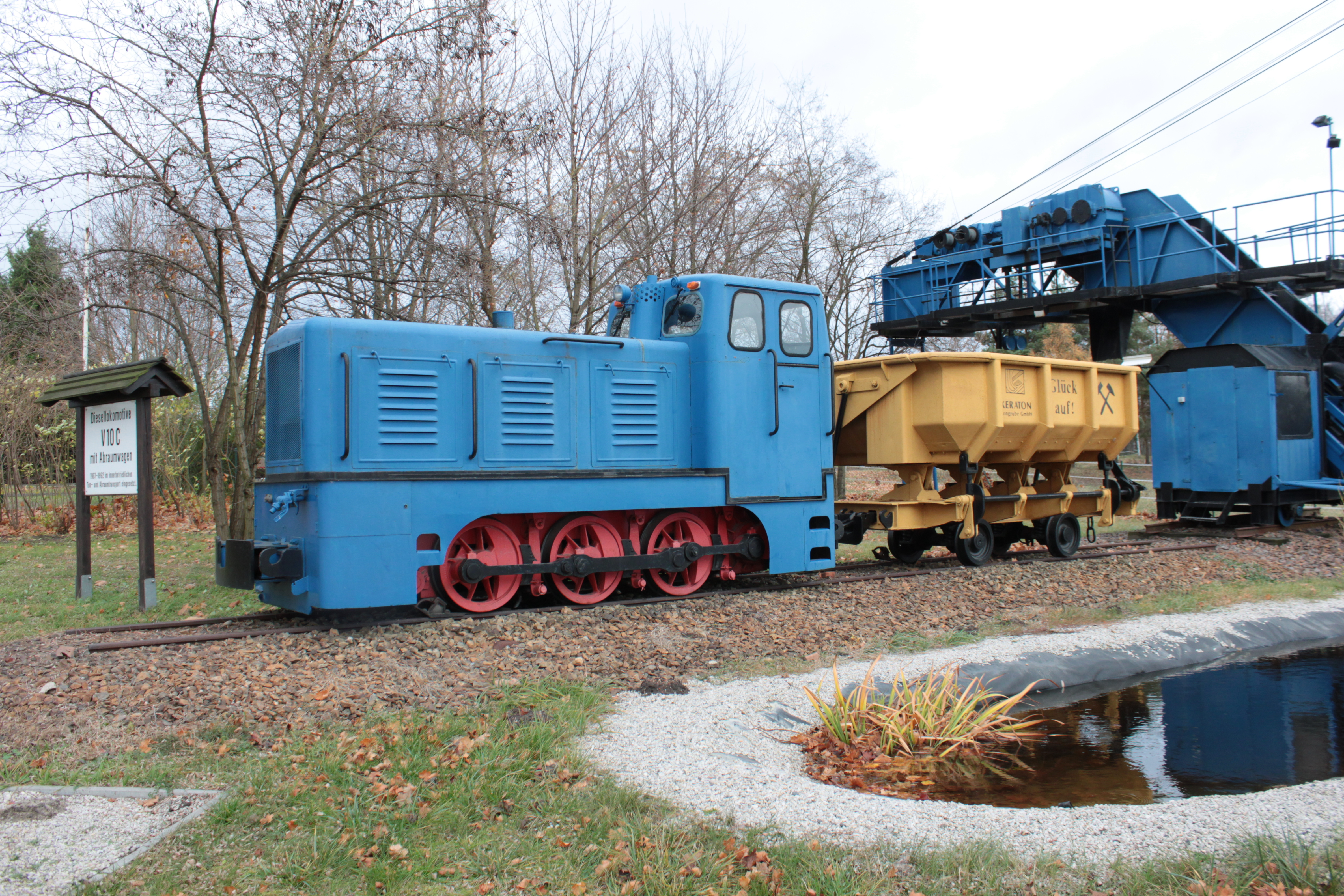 LKM V 10 C 250251 als Denkmallok am Tontagebau Plessa